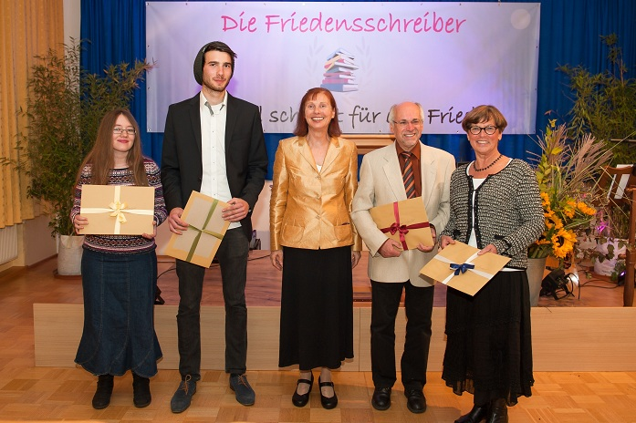 Preisverleihung FRIEDENSSCHREIBER 2014: Helene Walterskirchen mit den 4 Gewinnern